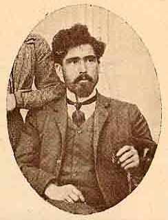 Христо Батанджиев.